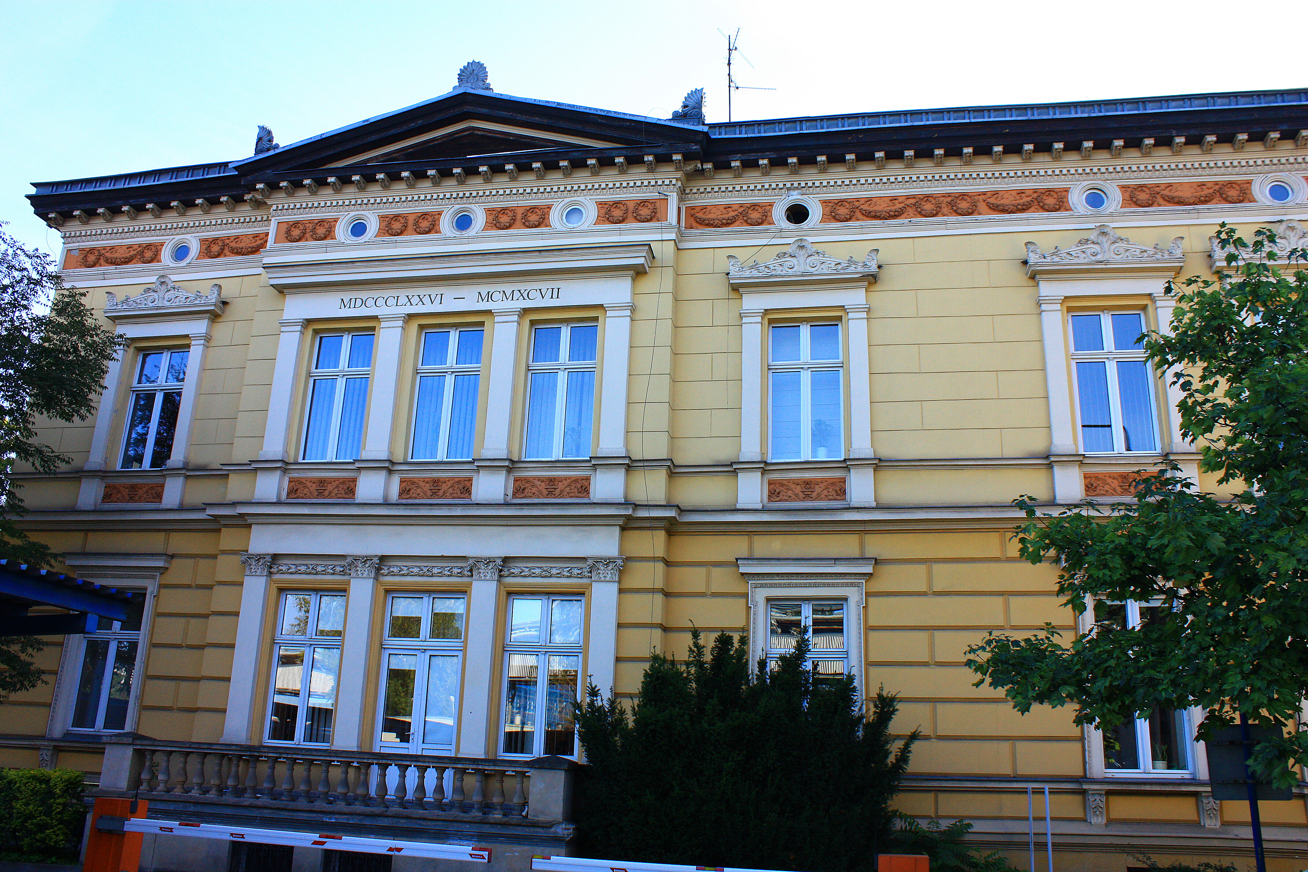 Wrocław, willa, 1876, 1925